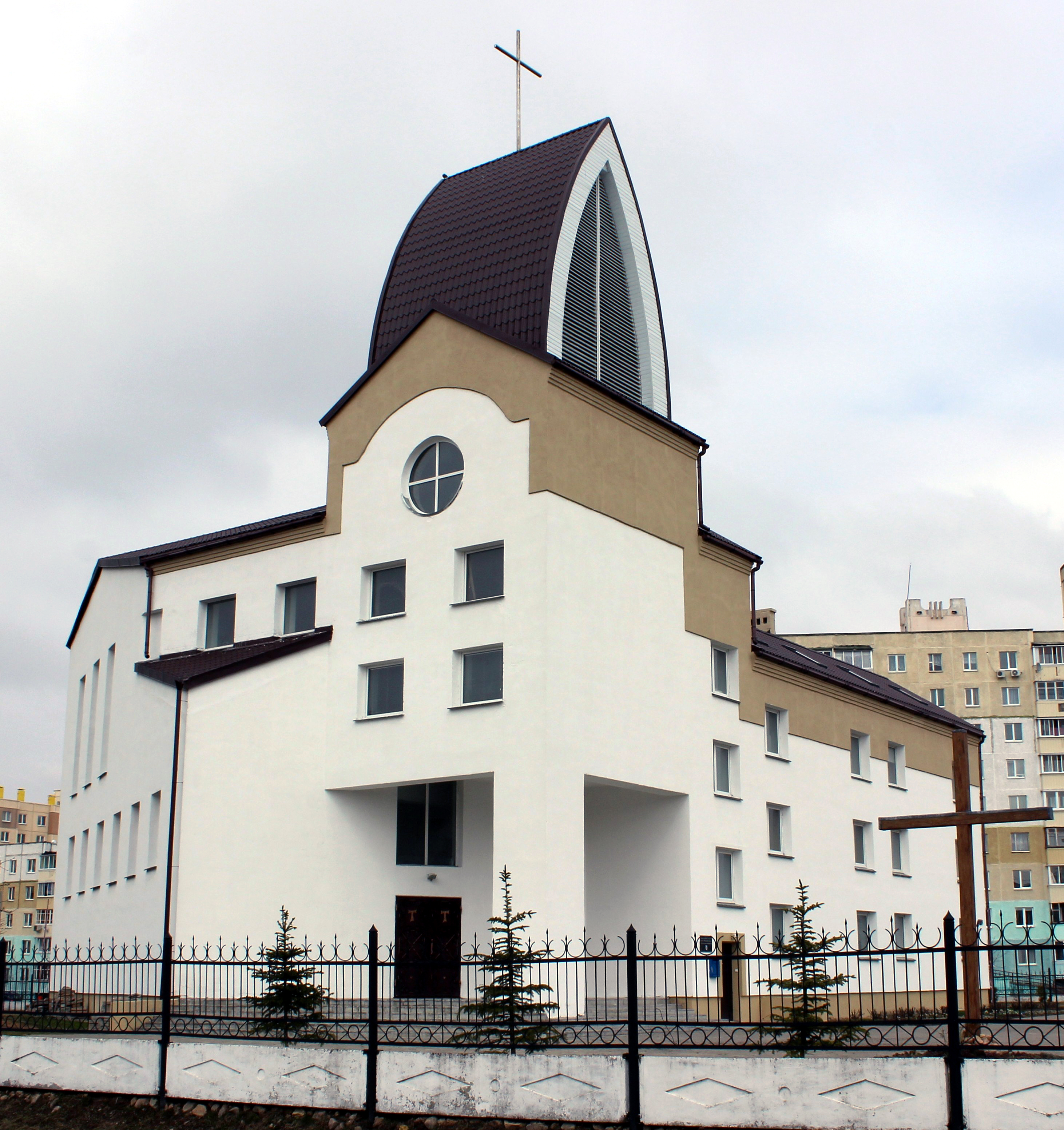 Костёл св. Франциска в городе Солигорске